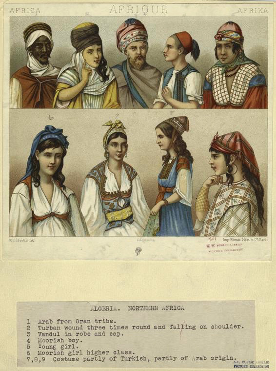 Hommes et femmes d'Algérie, XIXe siècle, portraits traditionnels